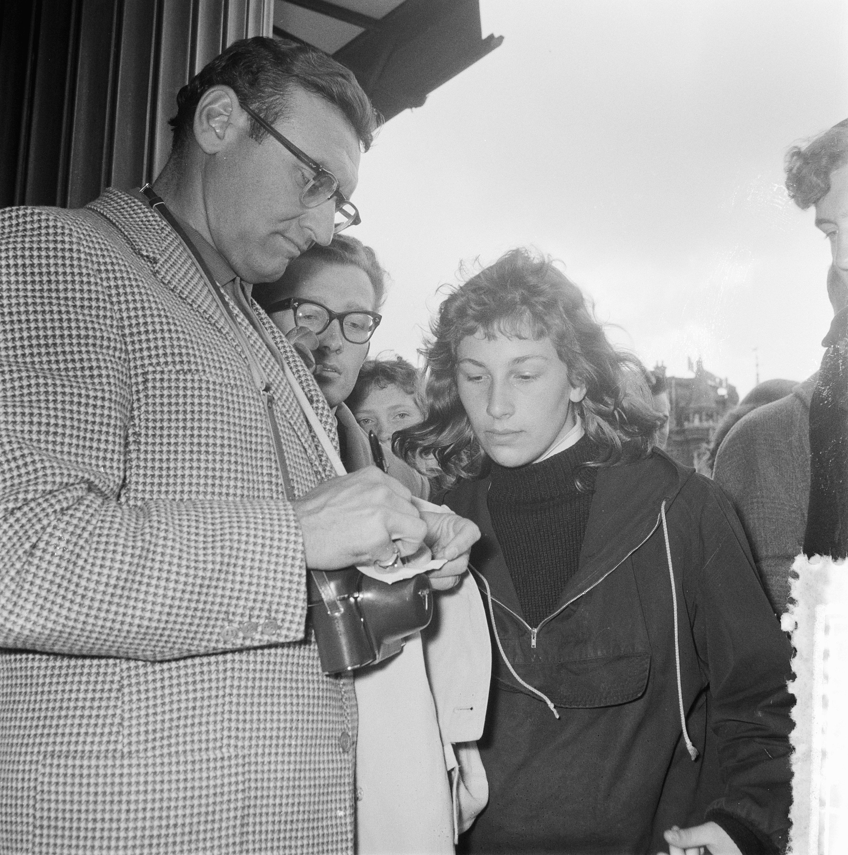 Collectie / Archief : Fotocollectie Anefo Reportage / Serie : [ onbekend ] Beschrijving : Frankie Laine in Amsterdam Datum : 6 mei 1957 Locatie : Amsterdam, Noord-Holland Persoonsnaam : Frankie Laine Fotograaf : Koch, Eric / Anefo Auteursrechthebbende : Nationaal Archief Materiaalsoort : Negatief (zwart/wit) Nummer archiefinventaris : bekijk toegang 2.24.01.03 Bestanddeelnummer : 908-5547